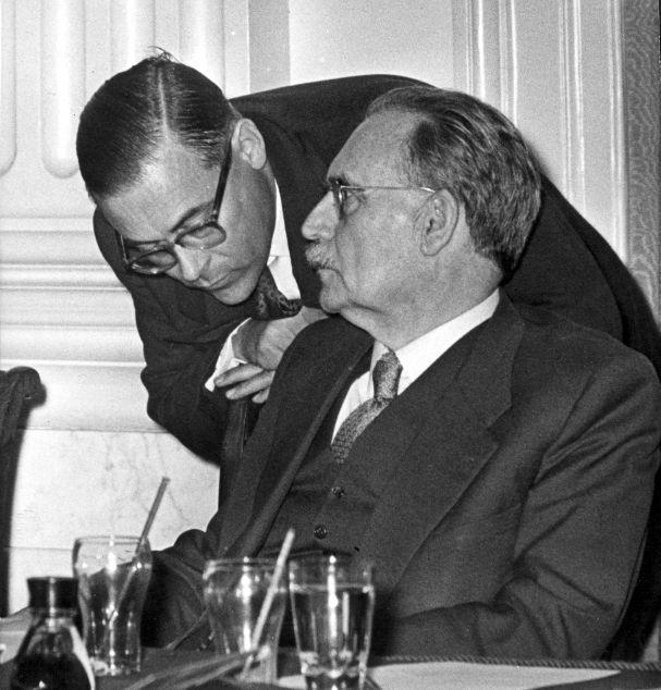 Dr. Willem Drees sr. en minister Witte in gesprek tijdens het huurdebat in de Tweede Kamer. 18 mei 1955